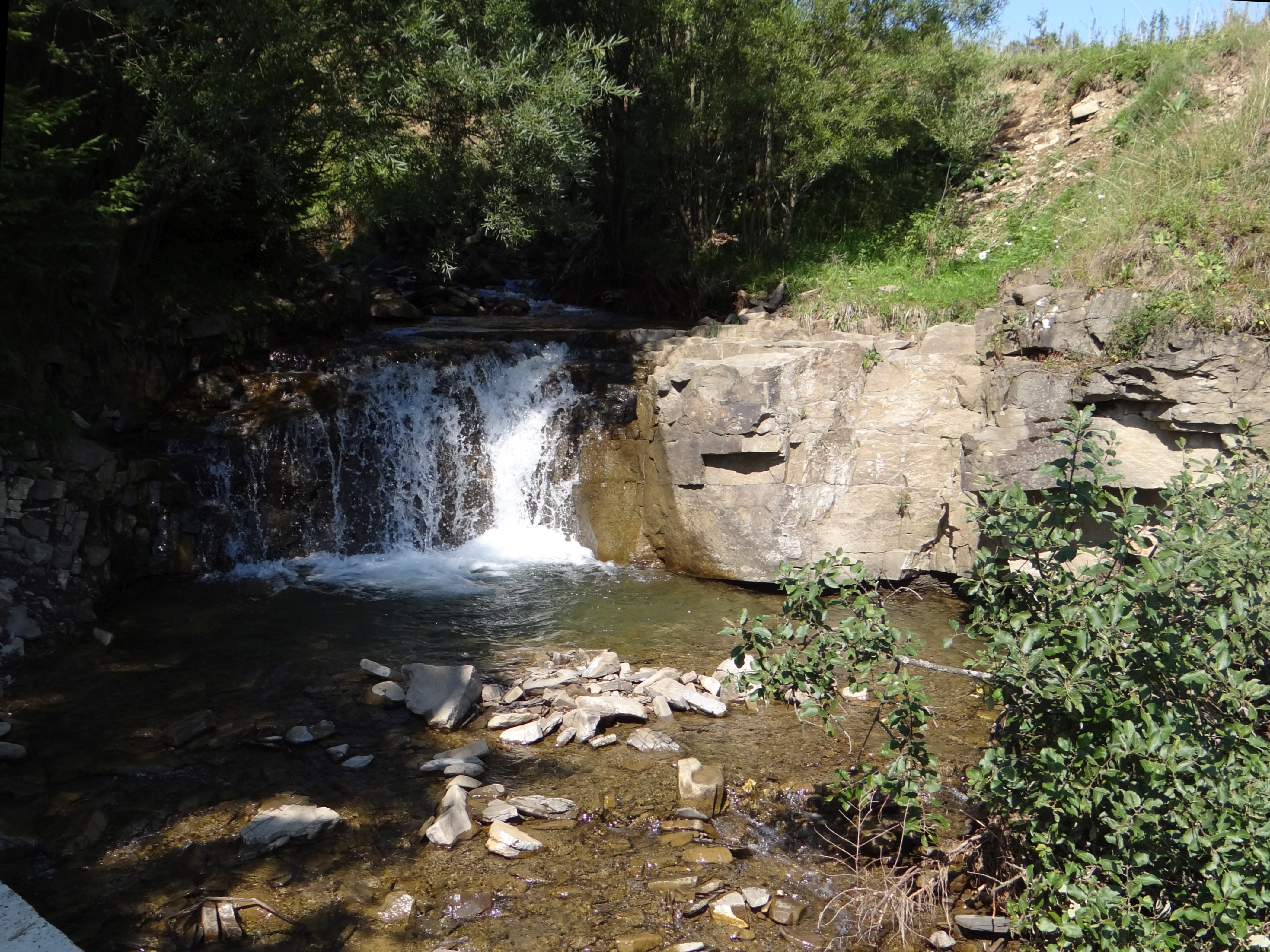 Kremeniak